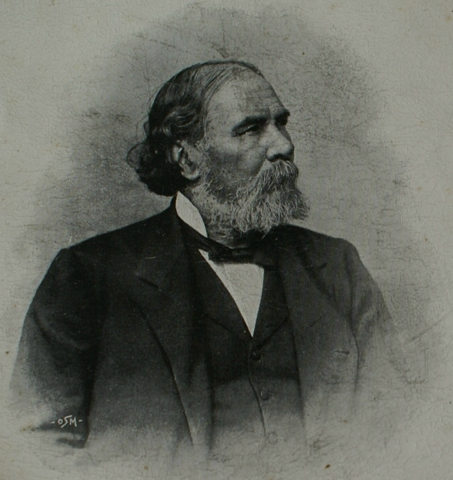 Ritratto di Menotti Garibaldi, inizio '900